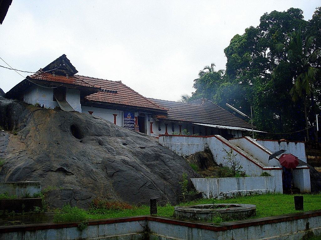 കേരളത്തിലെ ഒരു ഗുഹാക്ഷേത്രം...